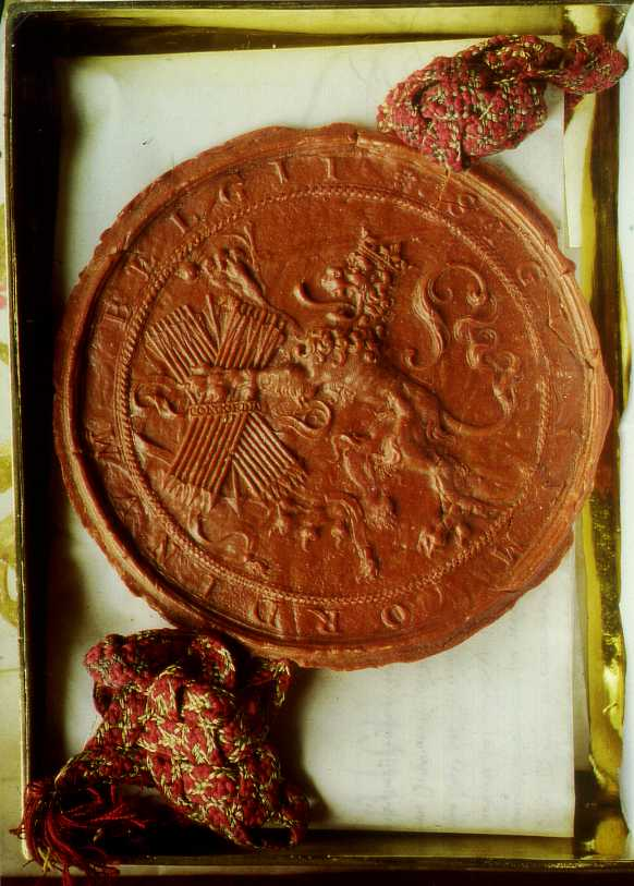 zegel Staten Generaal 1578 Coll. Kasteel Amerongen